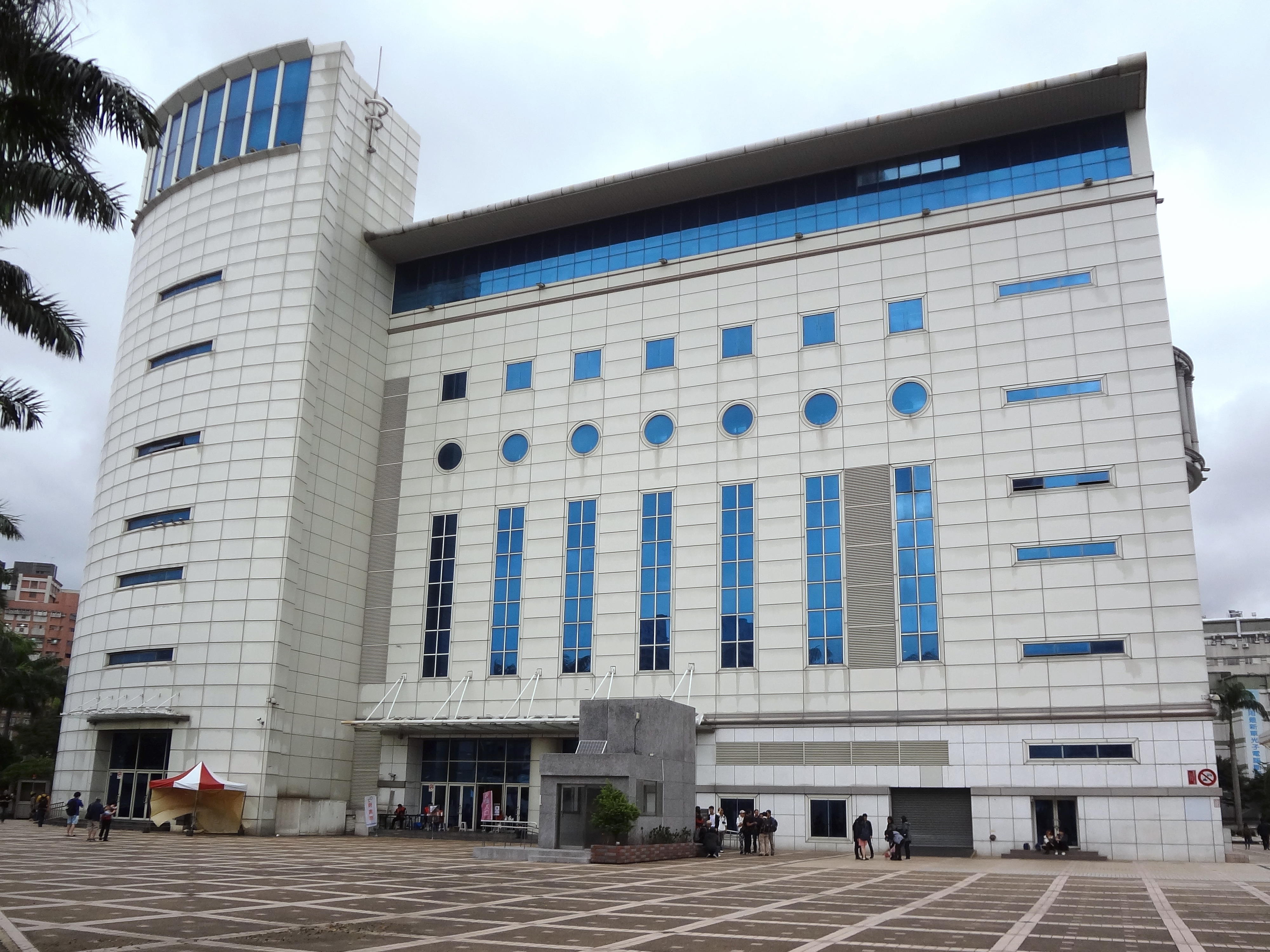 新北市三重區綜合體育館。